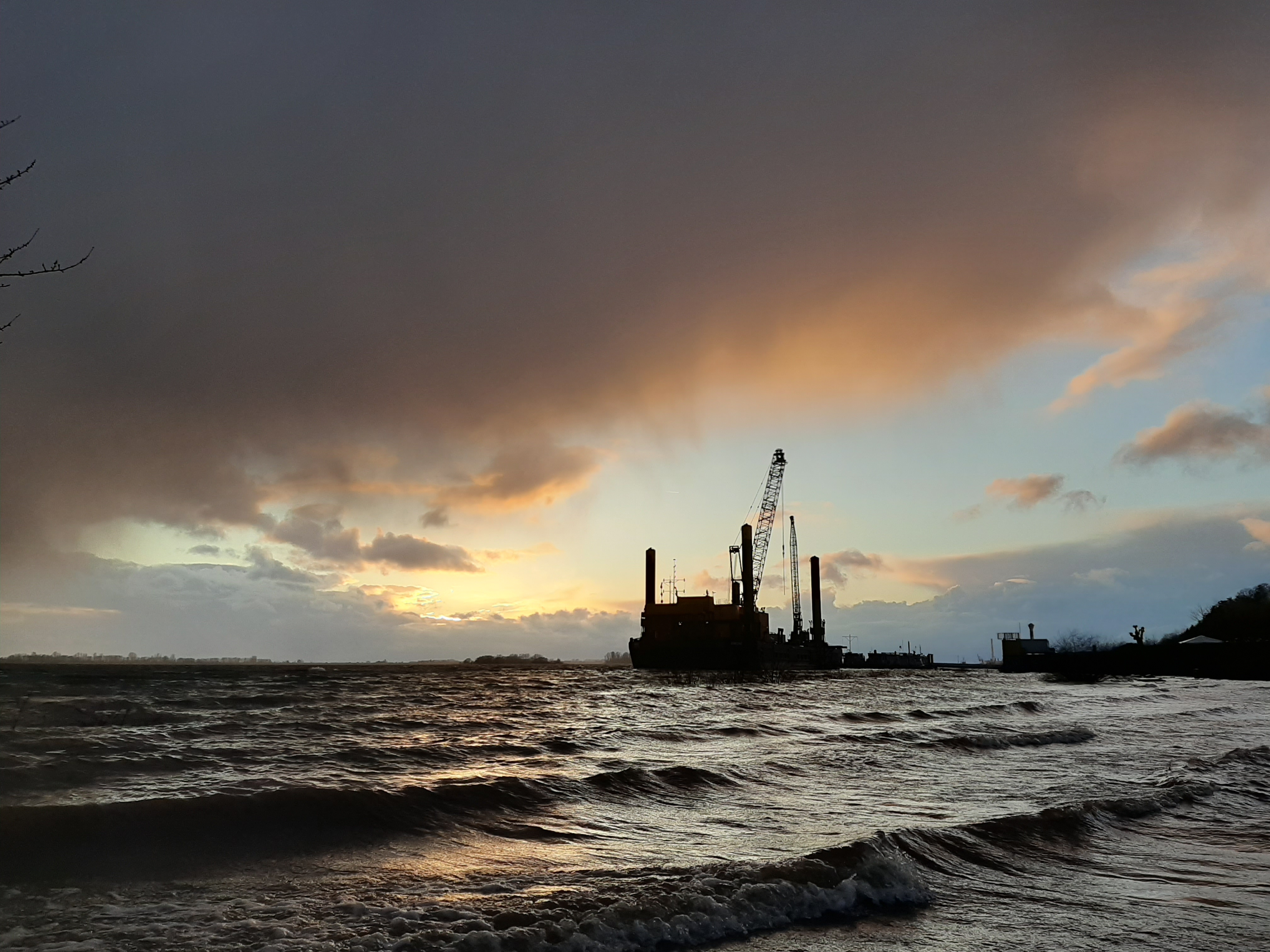 Die Baustelle des Neubaus des Leuchtturms Unterfeuer Blankenese der Richtfeuerlinie Blankenese bei winterlichem Hochwasser.